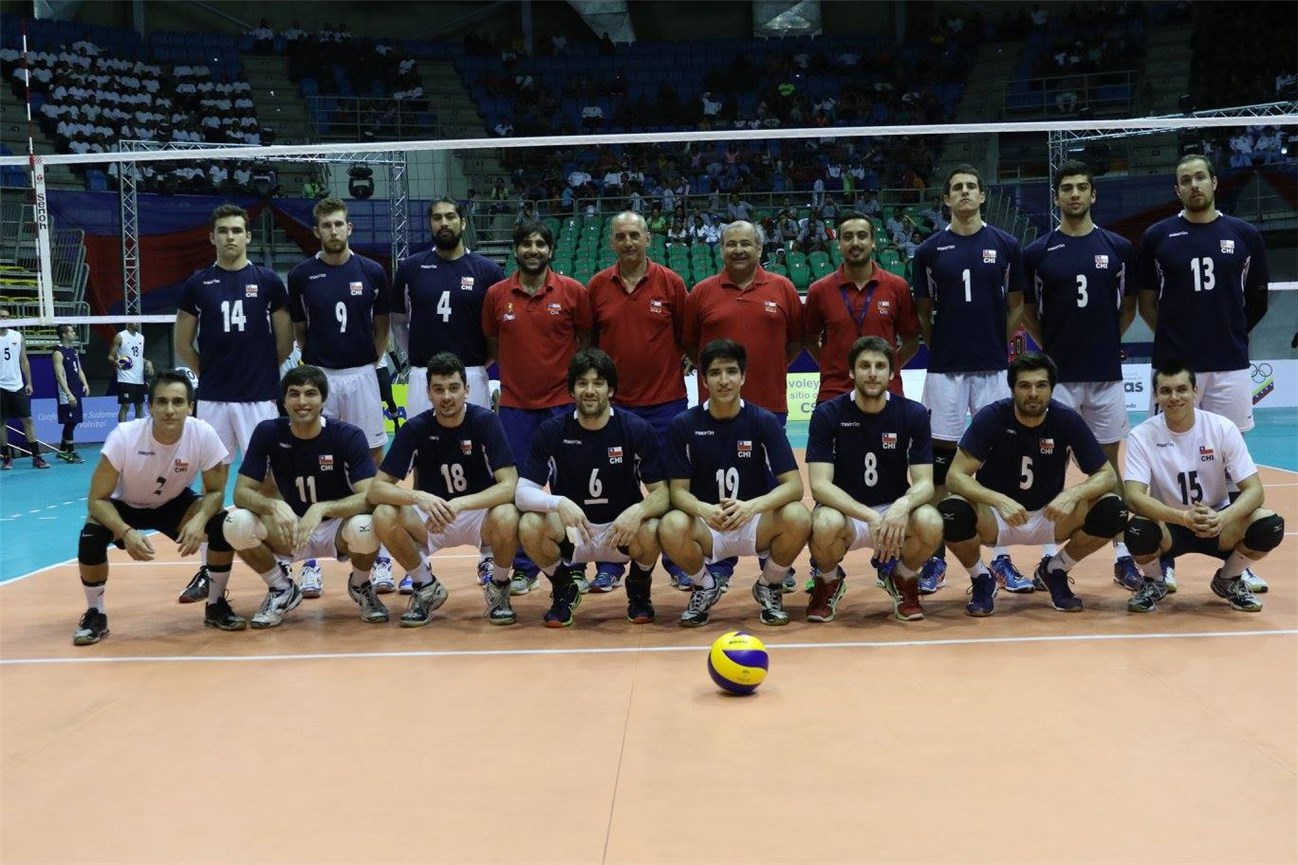 Imagen de la Selección Masculina de Voleibol de Chile, 2015